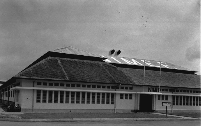 Foto. De NIMEF- fabriek in Djakarta.